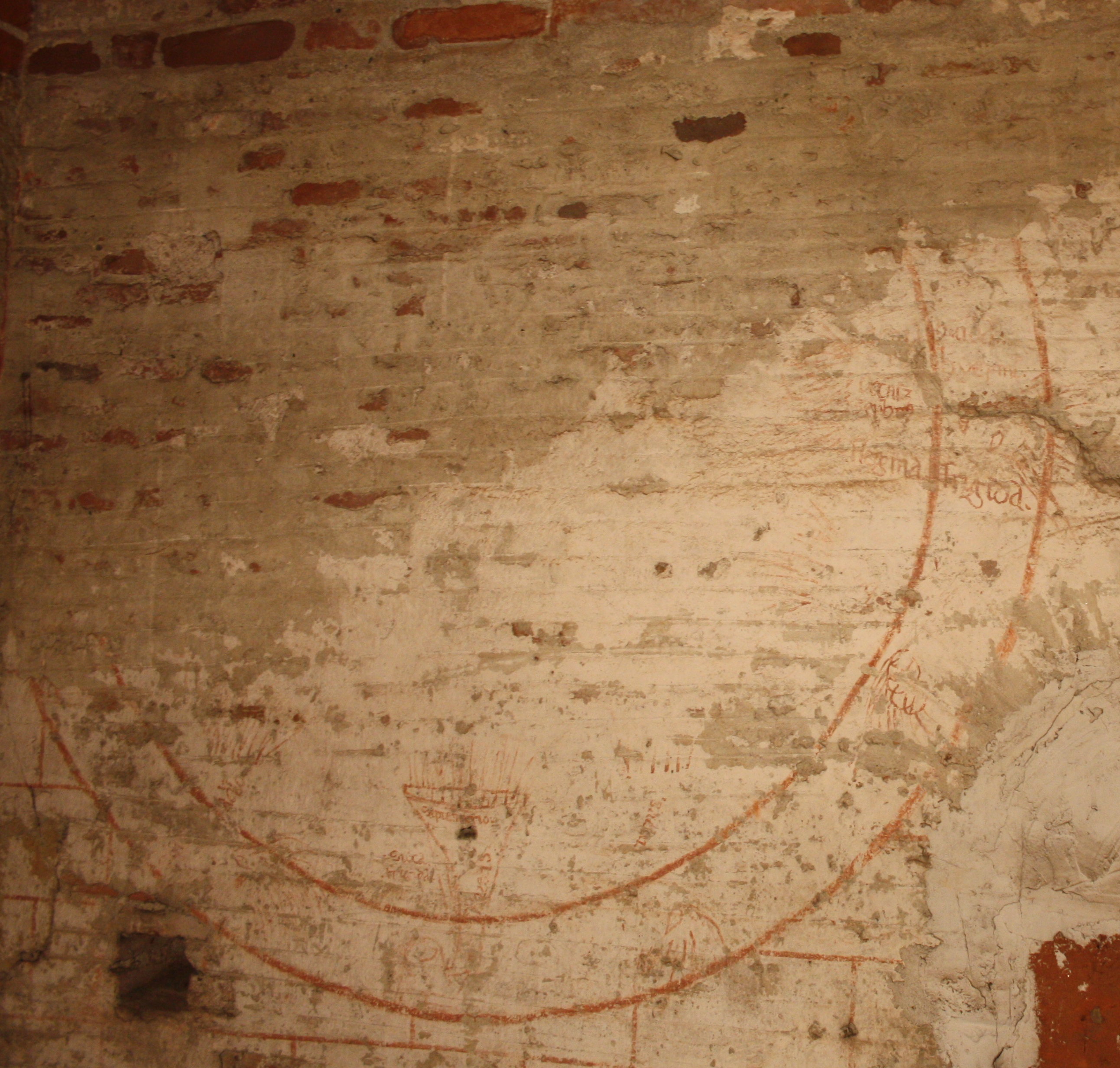 Première carte du ciel de la basilique Saint-Sernin, très abîmée, avec une représentation des vents.